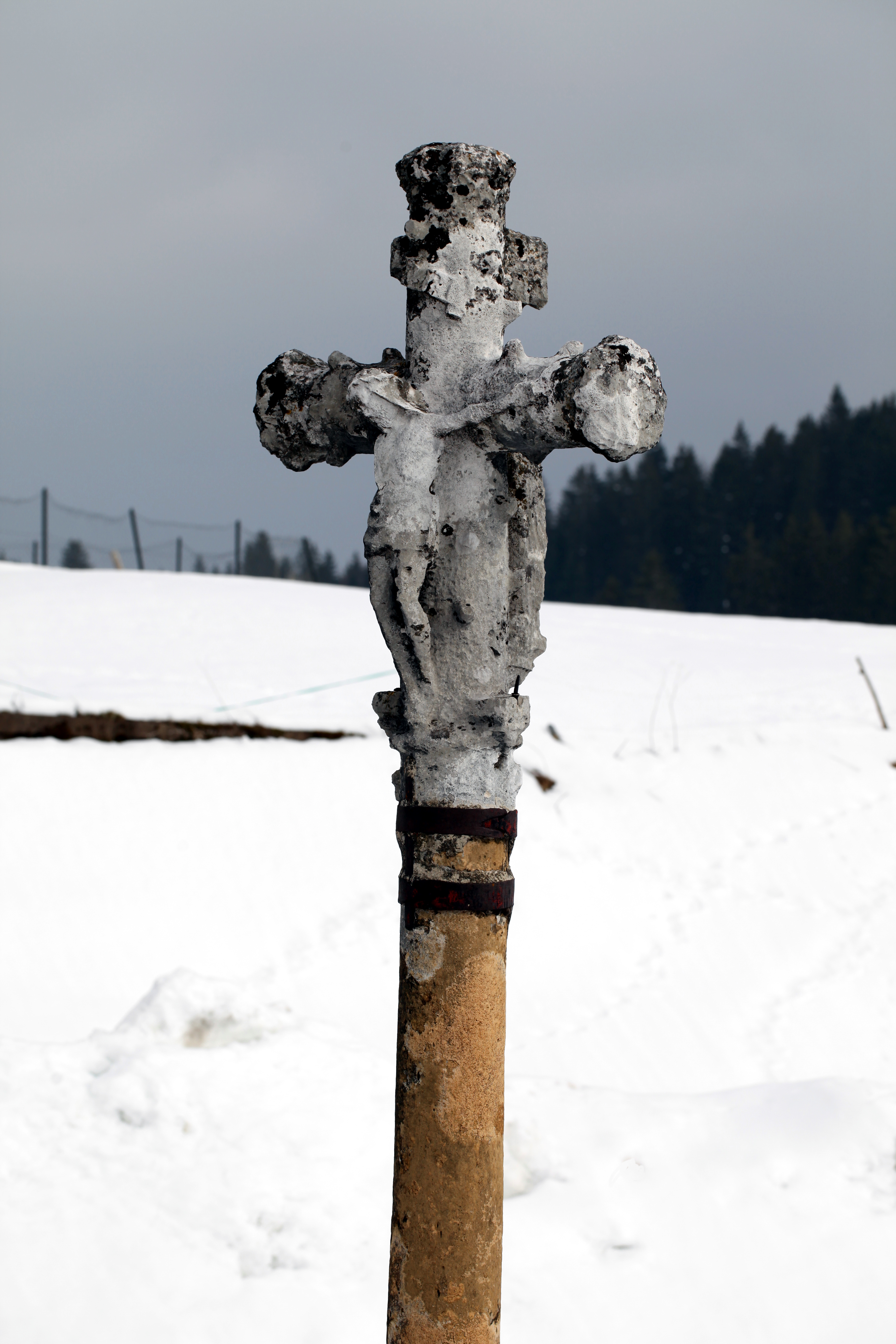 Croix monumentale à Reculfoz (Doubs).